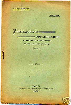 Учителската организация.